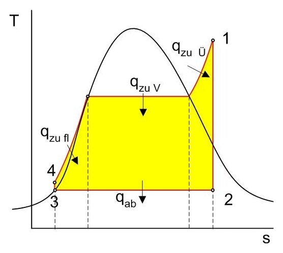 Clausius-Rankine-Prozess, T-s-Diagramm